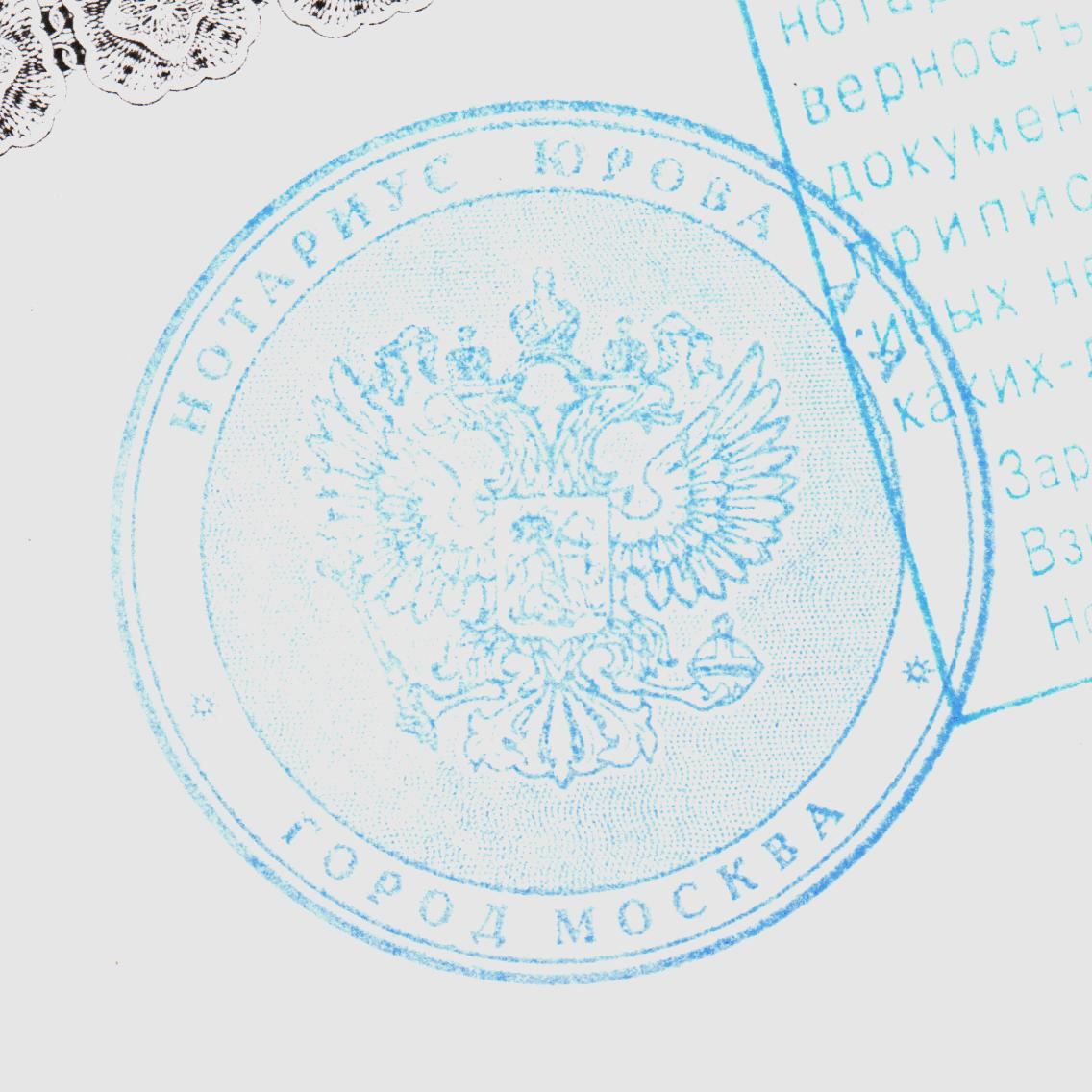 Современный герб Российской Федерации на старой (до сертификации 2003 года) печати нотариуса, Москва, 2002.